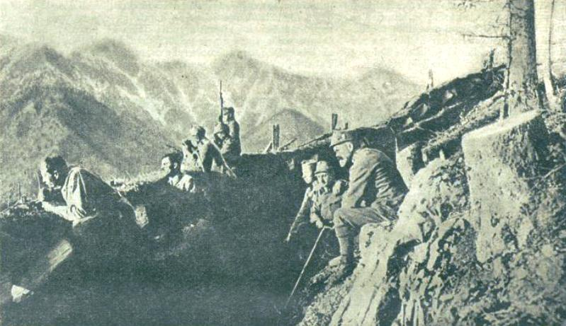 Častniki iz gorskega jarka opazujejo gibanje italijanskih čet.